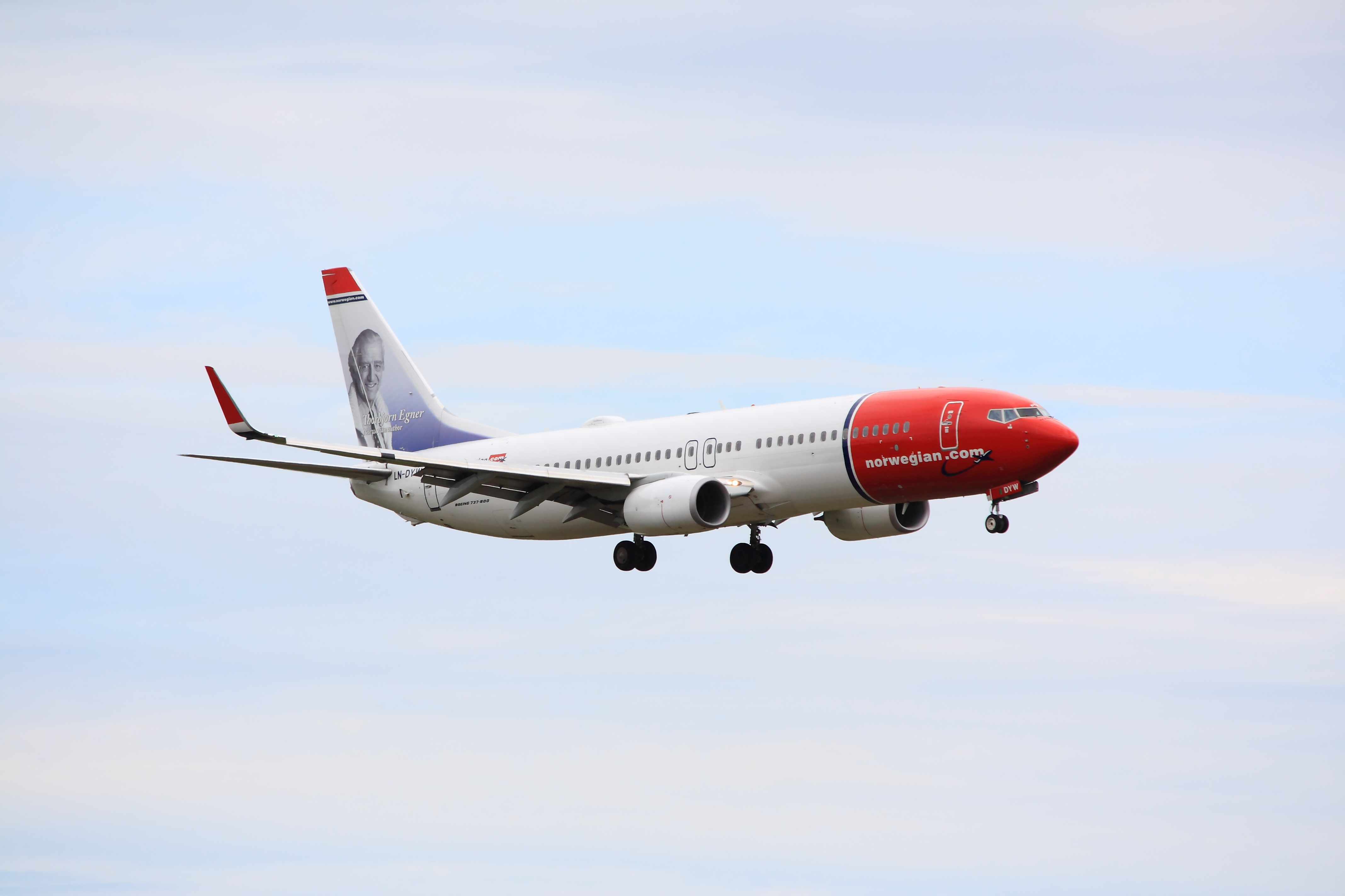 ln-dyw1